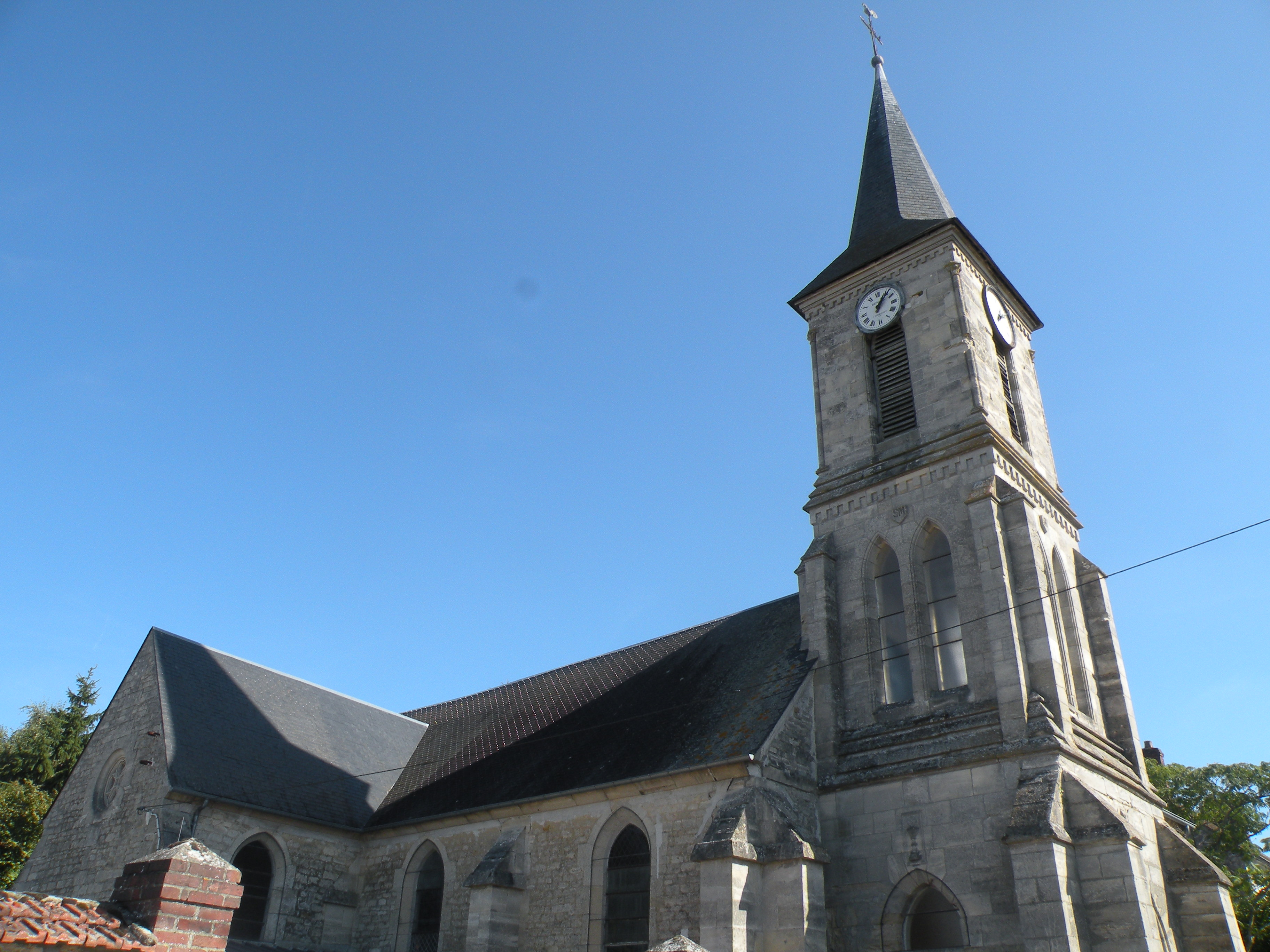 Eglise Saint Laurent de Monneville